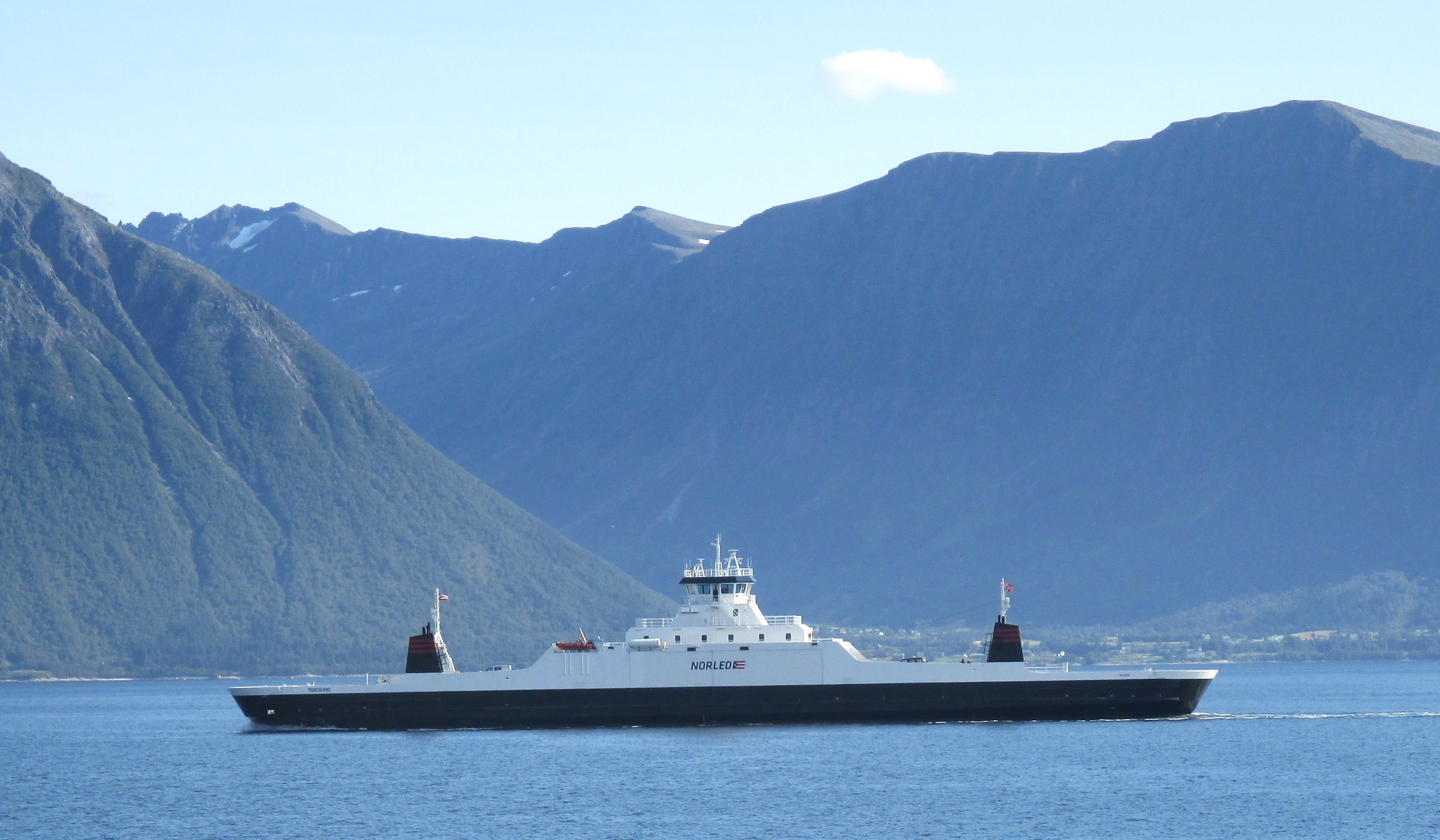 MF Tidesund mellom Sulesund og Hareid i 2014